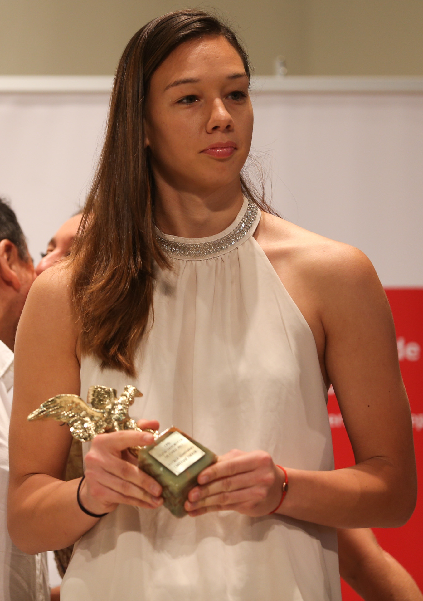 El Ministro del Deporte, Pablo Squella, y la Subsecretaria del Deporte, Nicole Sáez, participaron de la tradicional ceremonia que organiza el Círculo de Periodistas Deportivos de Chile (CPD). En la Fotografia: Claudia Christiane Endler Mutinelli (Santiago, 23 de julio de 1991)1​ es una futbolista chilena. Juega de guardameta y su equipo actual es el PSG Fémenines de la Division 1 Féminine y en la selección chilena, de la cual es capitana. Ha jugado por la selección de fútbol femenino sub 17 y la selección de fútbol femenino sub 20, participando en el Sudamericano Femenino Sub-17 y en la Copa Mundial Femenina de Fútbol Sub-20 de 2008.